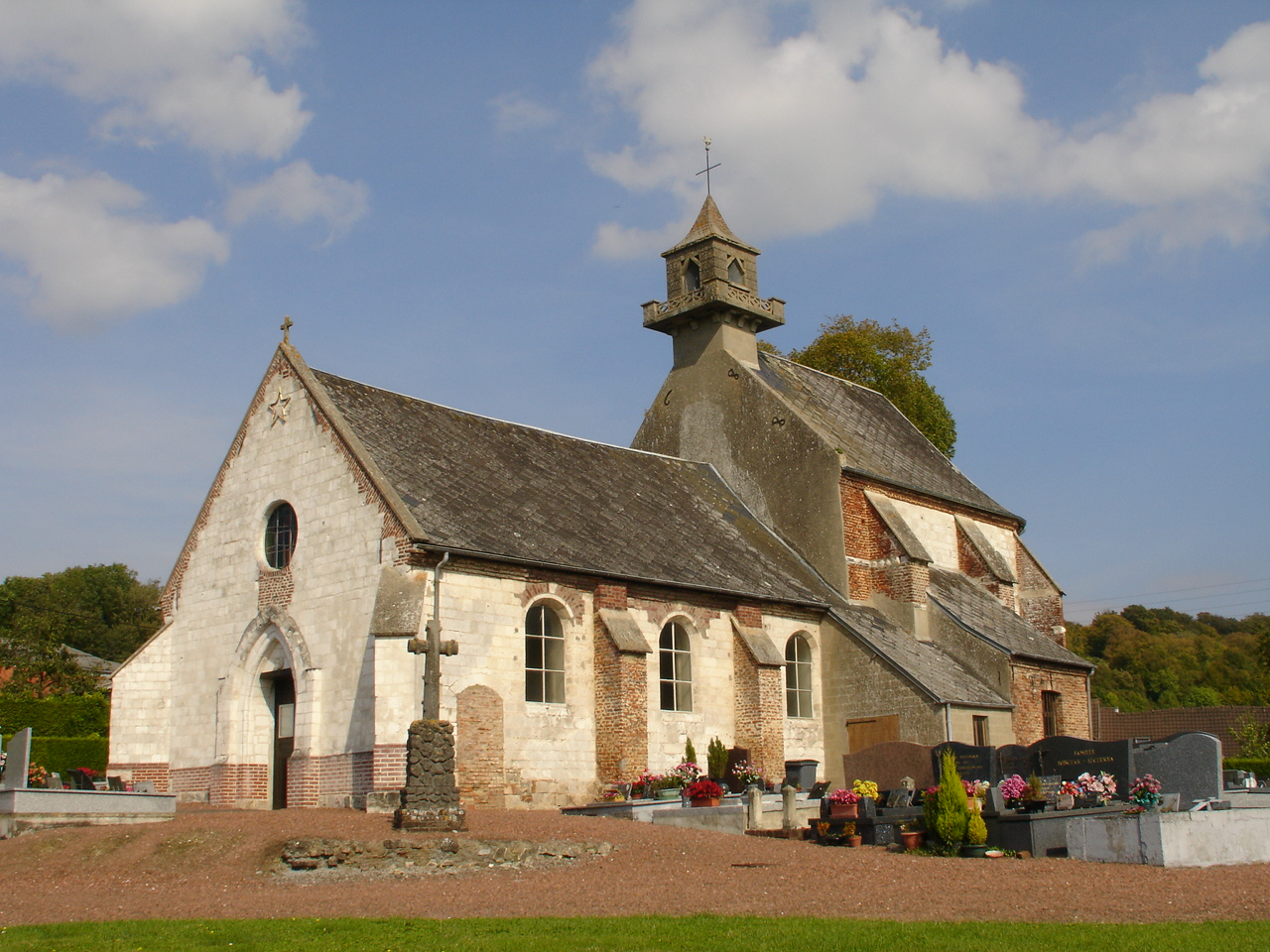 Église Saint-Vaat de Bouret-sur-Canche